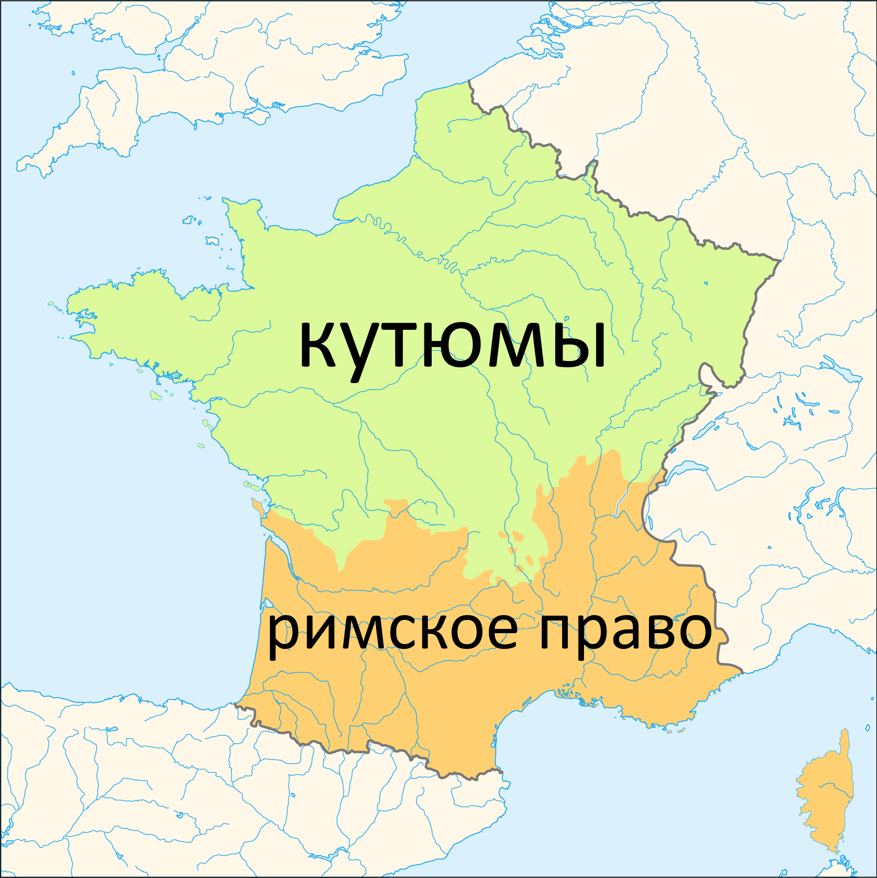 Karte der Rechtskreise des droit écrit (Römisches Recht) und des droit coutumier (Gewohnheitsrecht) im französischen Ancien Regime